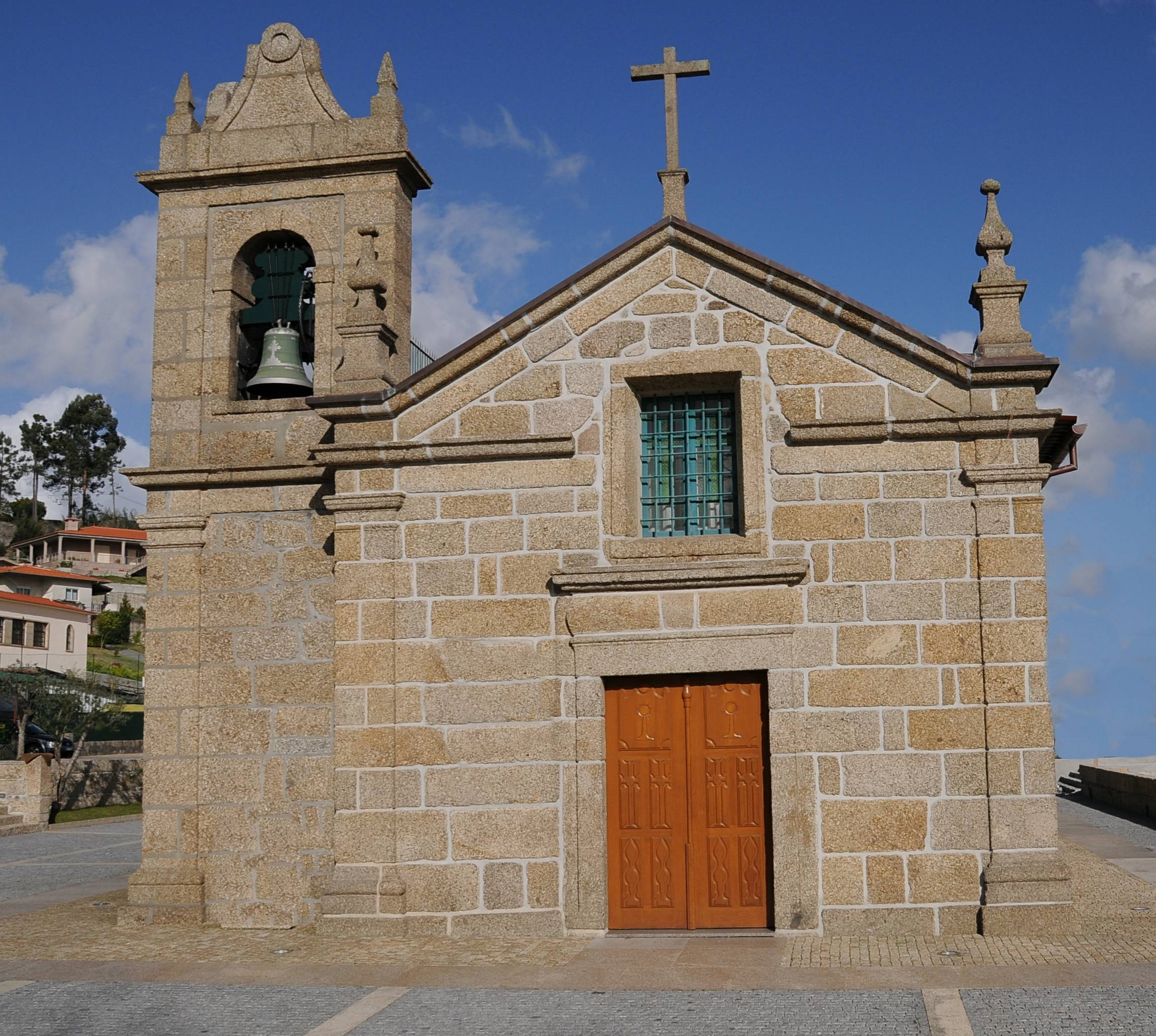 Tebosa Church, in Braga, Portugal